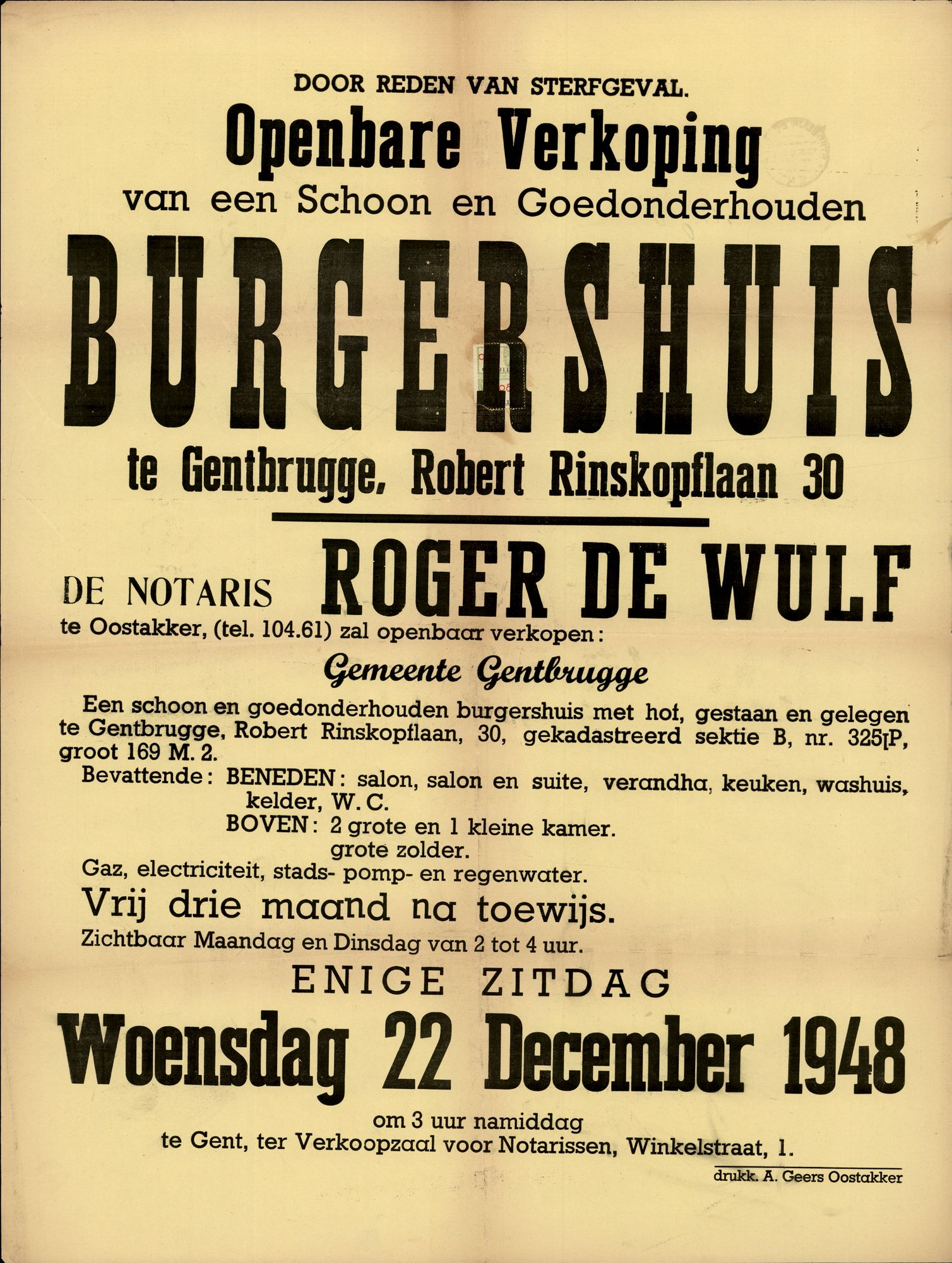 Openbare verkoop van een schoon en goedonderhouden burgershuis te Gentbrugge, Robert Rinskopflaan, nr.30, Gent, 22 december 1948 Door reden van sterfgeval. De Notaris Roger De Wulf te Oostakker, (tel.104.61) zal openbaar verkopen: Gemeente Gentbrugge. Een schoon en goedonderhouden burgershuis met hof, gestaan en gelegen te Gentbrugge, Robert Rinskopflaan, 30, gekadastreerd sektie B, nr. 325P, groot 169 M.2. Gaz, electriciteit, stads- pomp- en regenwater. Vrij drie maand na toewijs.